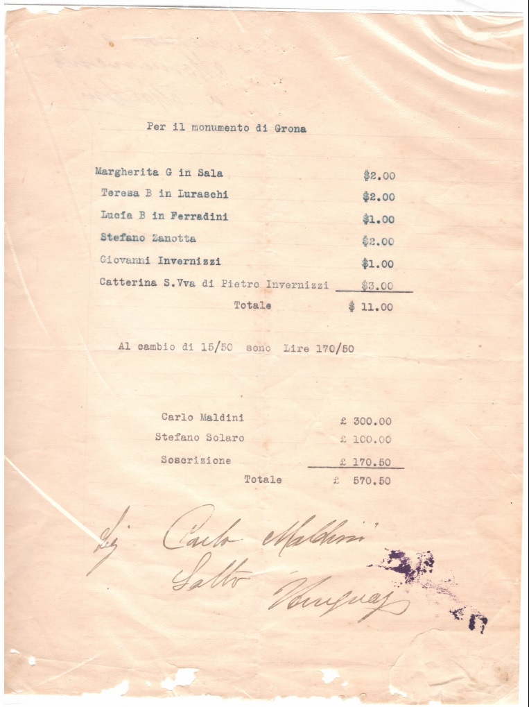 Sottoscrizione degli emigranti di Bene Lario per realizzare il monumento ai Caduti di Grona. Il documento è parte dell'archivio privato Roberta Scheggia in passaggio al costituendo Museo dell'emigrante a Bene Lario. Nella prima parte vi sono i conferimenti in peso uruguaiano, segue qui il tasso di cambio per la conversione in lire italiane e infine il totale della donazione in lire italiane. La nota è firmata da Carlo Maldini che ha vergato a mano anche il luogo dell'avvenuta sottoscrizione: "Salto, Uruguay". Il documento viene datato 1923.